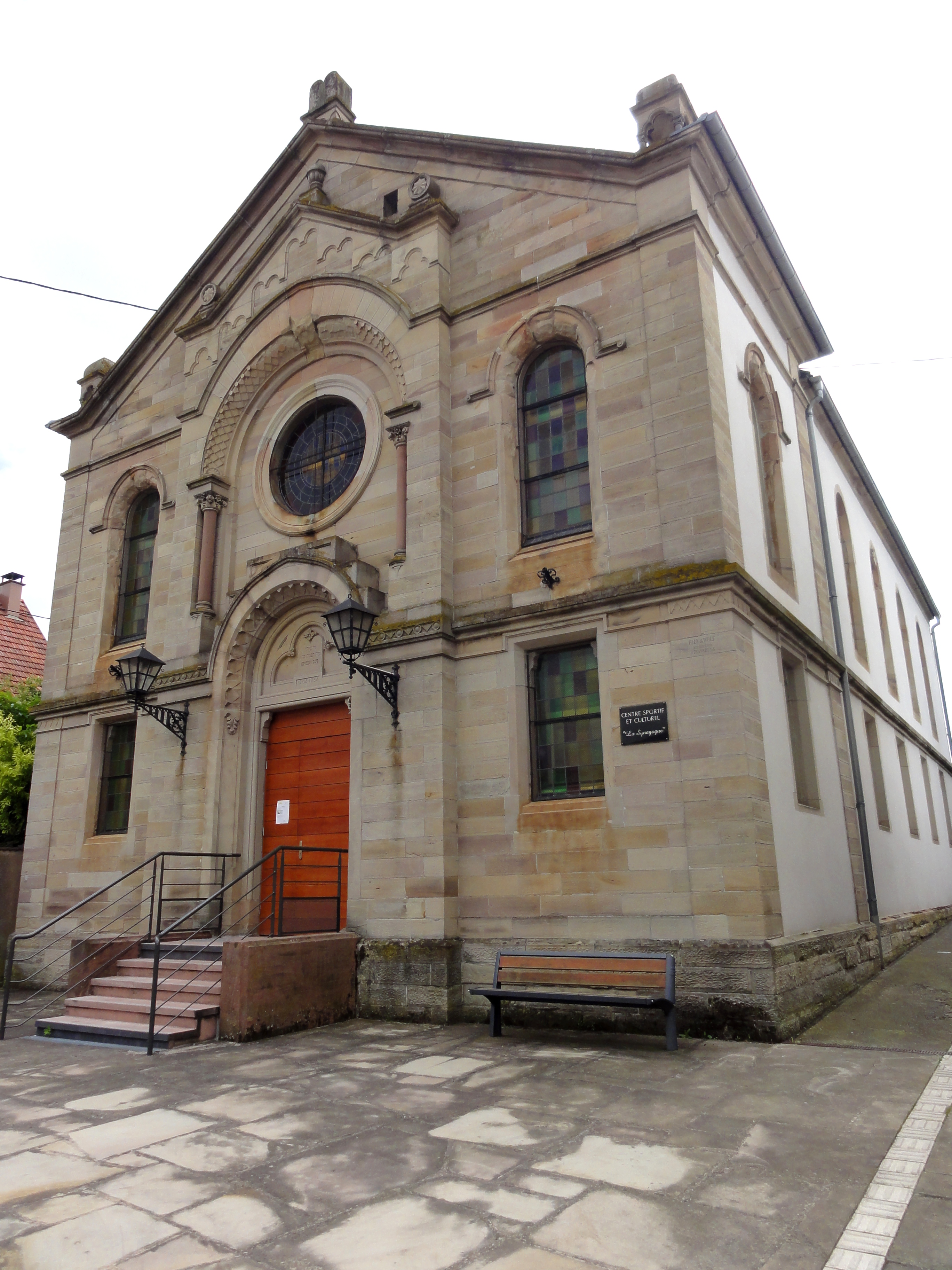 Alsace, Bas-Rhin, Mommenheim, Synagogue (1904), rue des Juifs. .